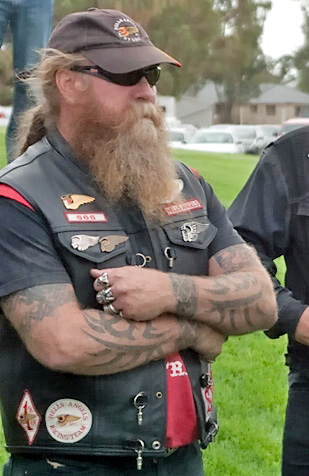 Ein australisches Mitglied der Hells Angels (Charter Hells Angels MC Australia); hier in der Nähe von Adelaide im April 2008 bei einer Protestveranstaltung ("Gypsy Joker Protest Run") verschiedener australischer Motorrad-Clubs gegen staatliche Auflagen bzw. Verbote.